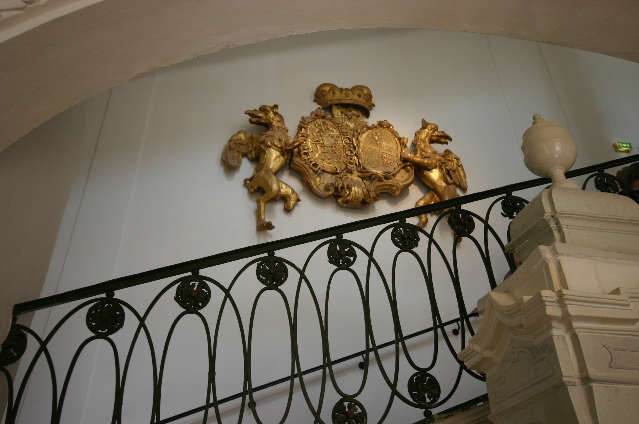 Wappen der Esterházys